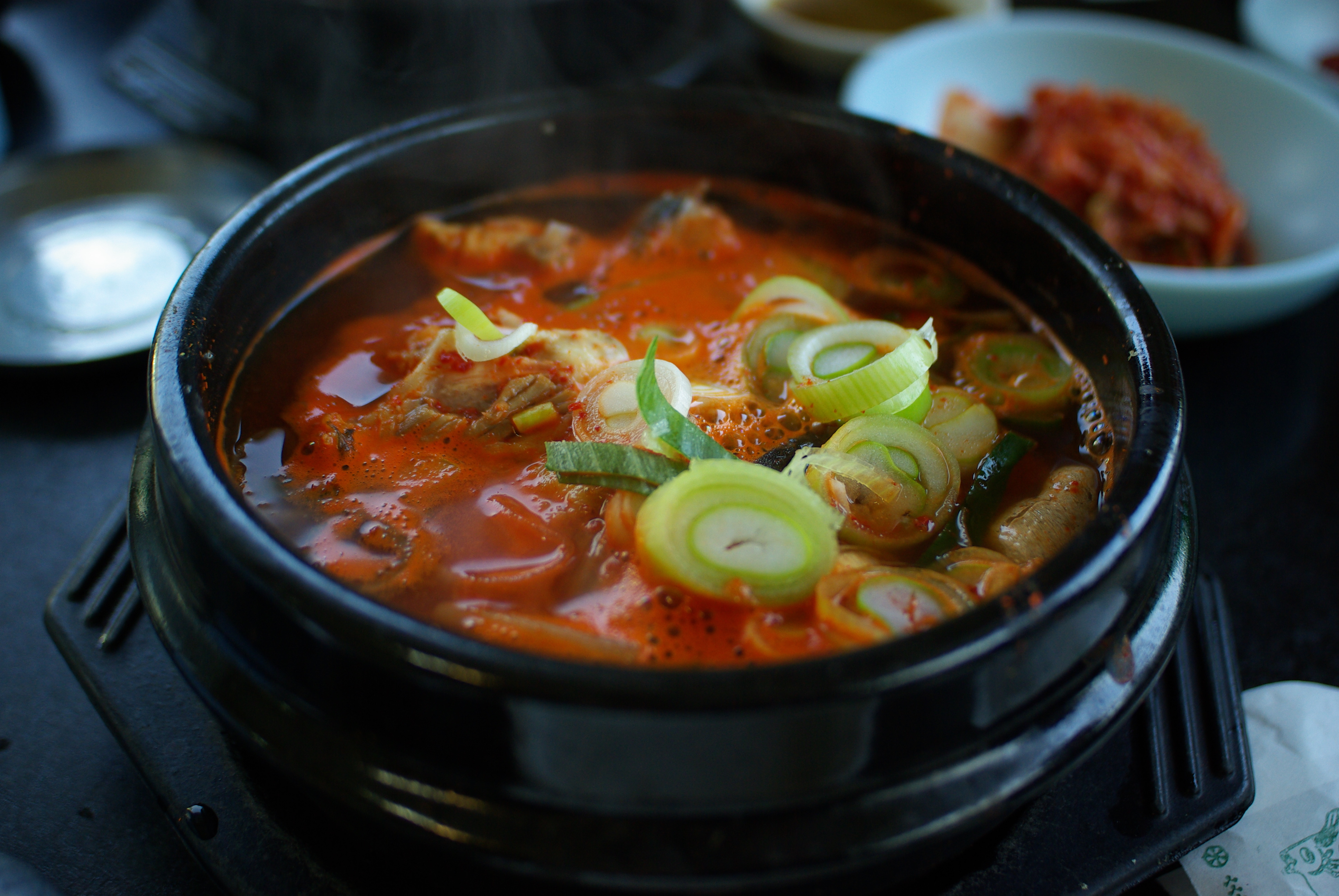 Bogeo haejangguk, 대전 유성의 어느 한 복어 해장국